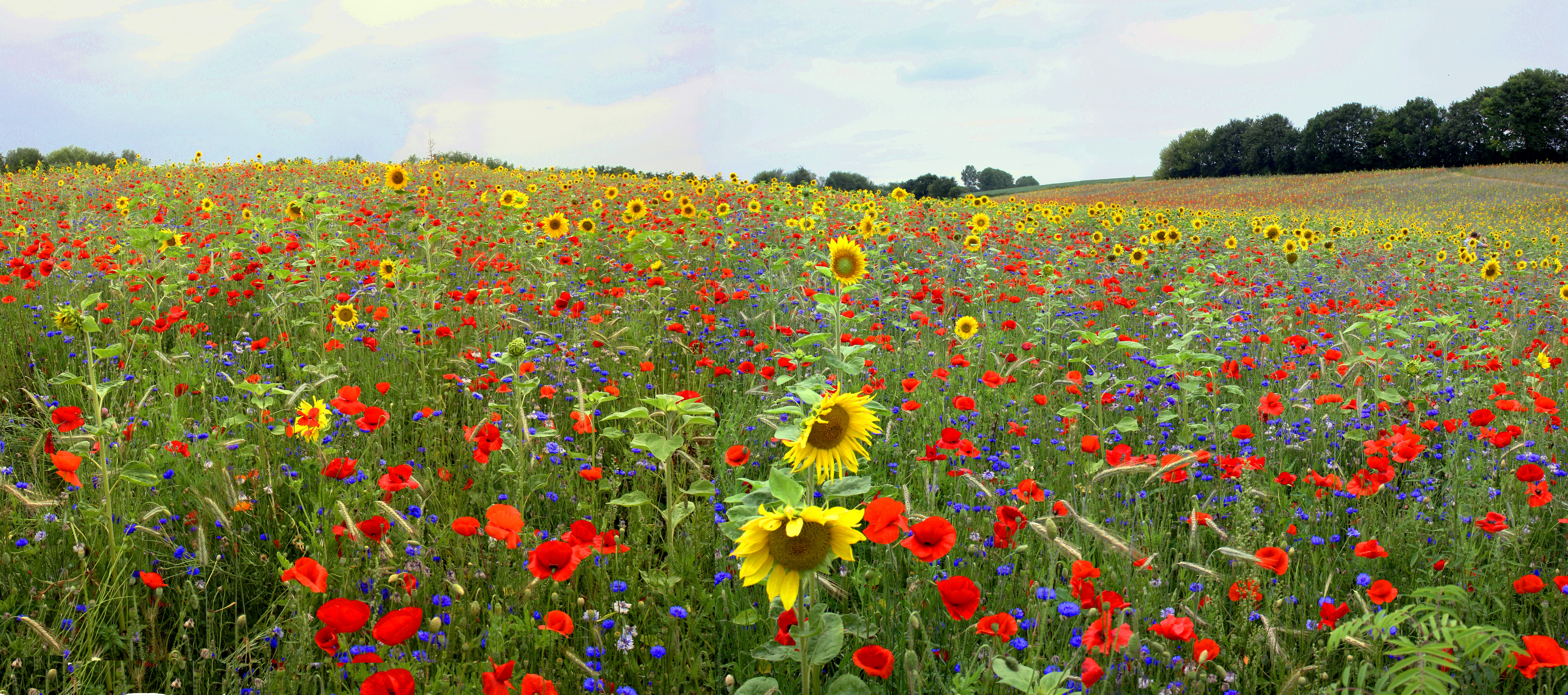 Speciaal gezaaid weiland naast de N276 in Brunssum.